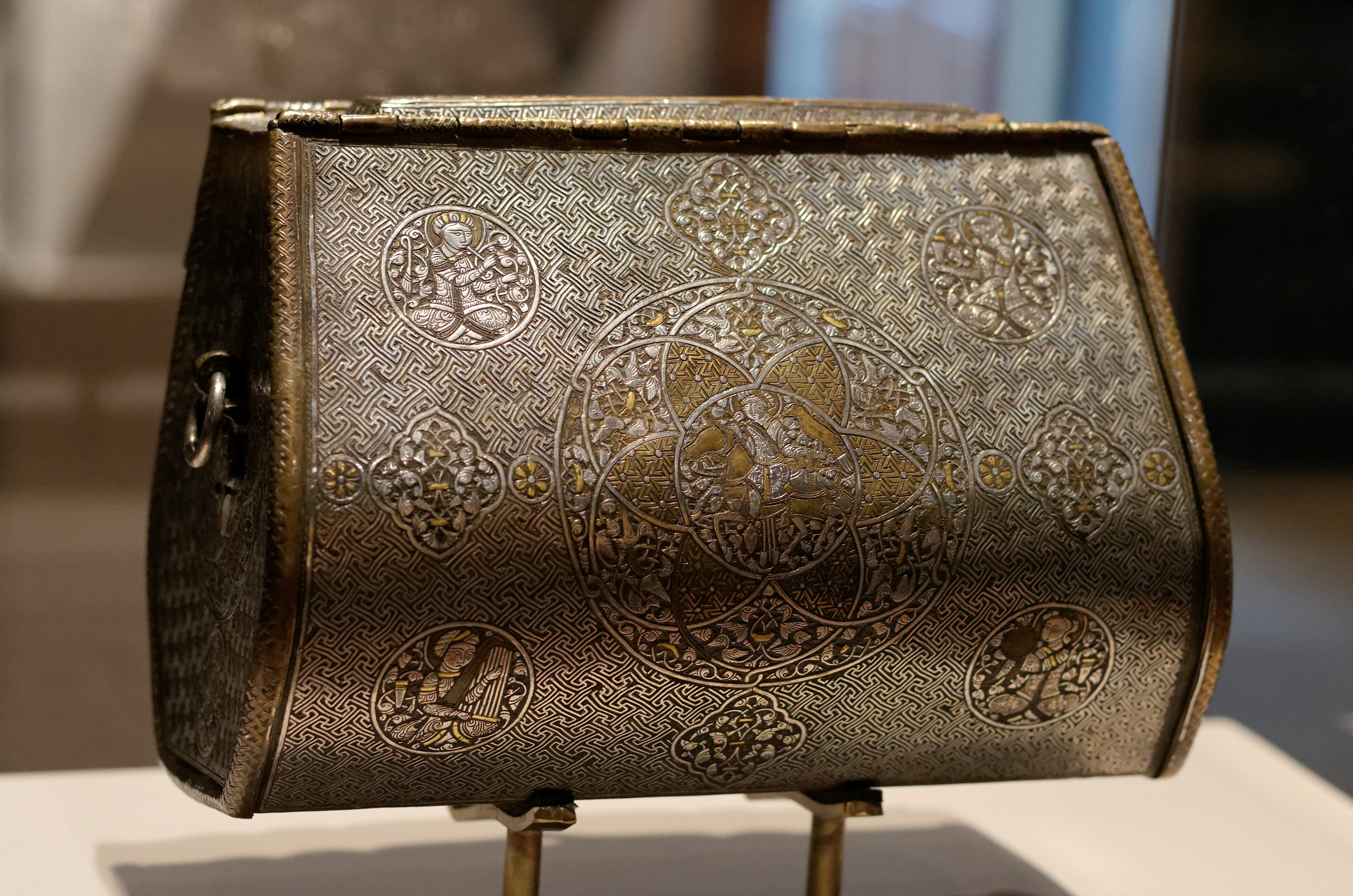 Bag Mosul (1300-1330). Gambier Parry Courtauld Gallery. Brass, raised, engraved and inlaid with gold, silver and black material